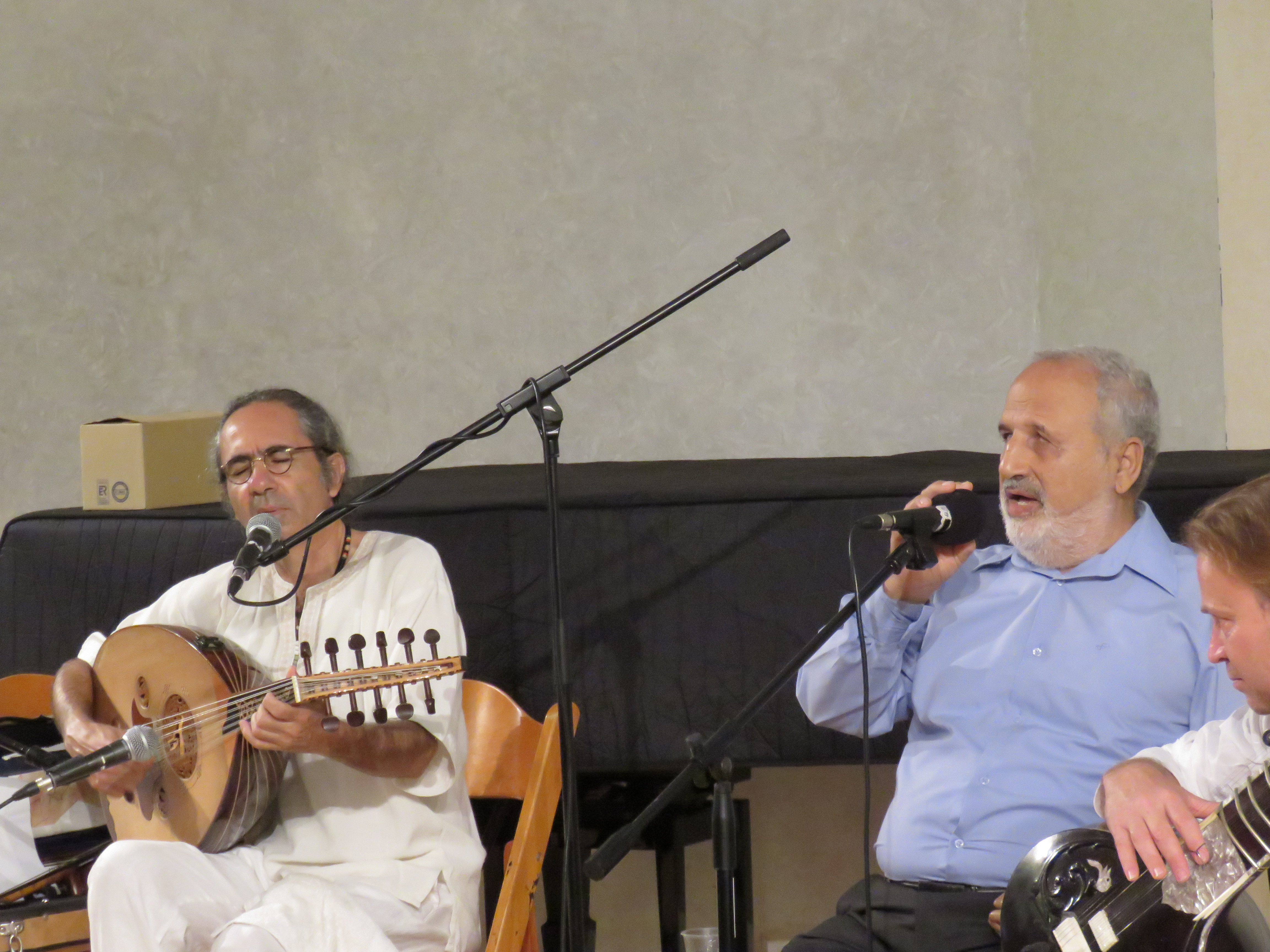 יאיר דלאל וארז ביטון, מרכז פליציה בלומנטל למוזיקהת 22 באוגוסט 2015